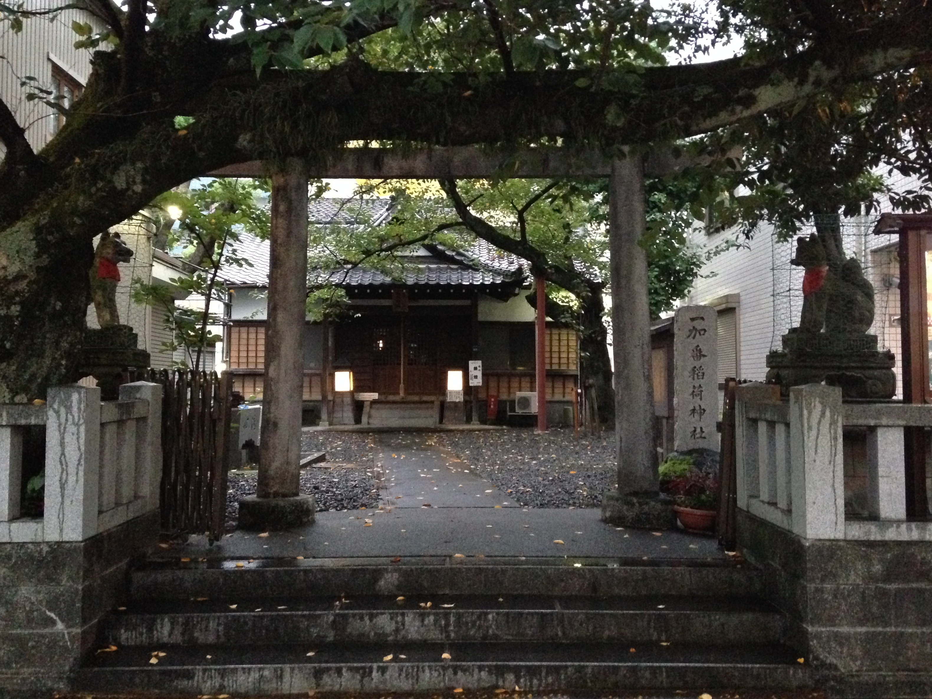 静岡県静岡市葵区鷹匠・一加番稲荷神社